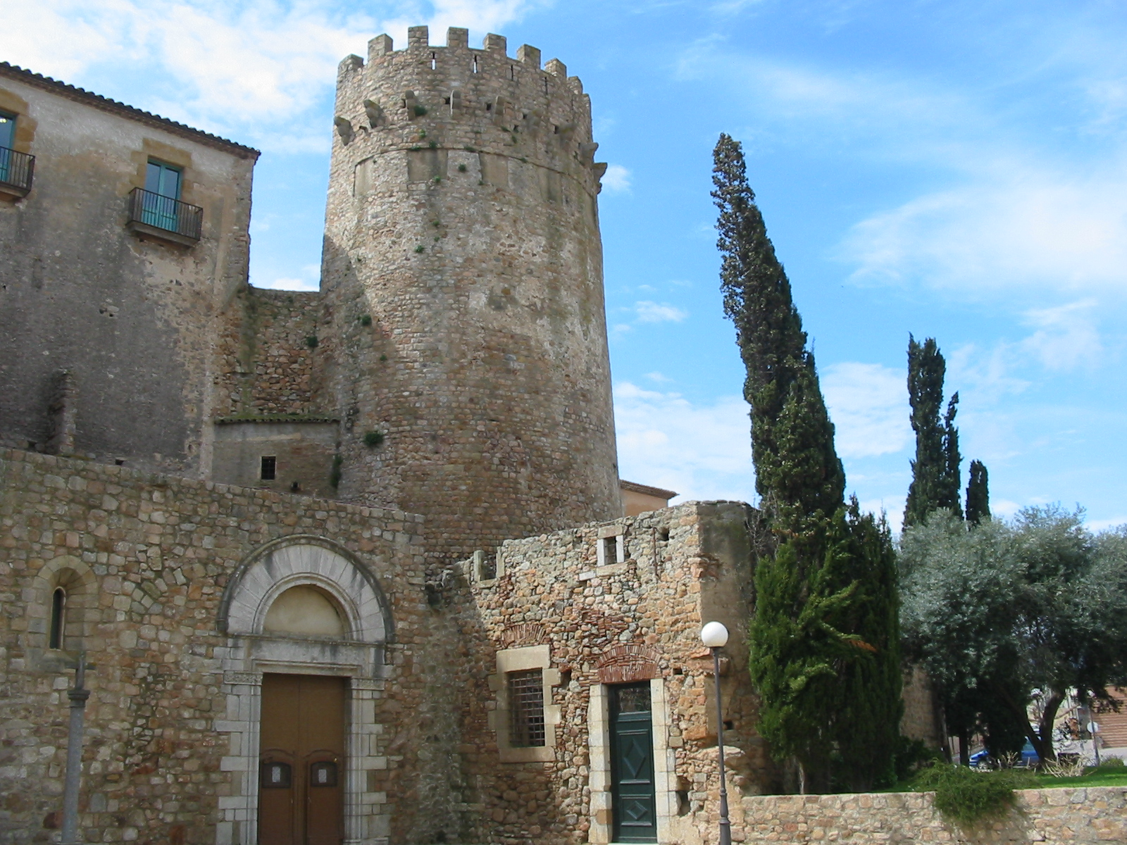 Sant Feliu de Guixols, Costa Brava, Catalonia: Torre del Fum (medieval tower of city walls)